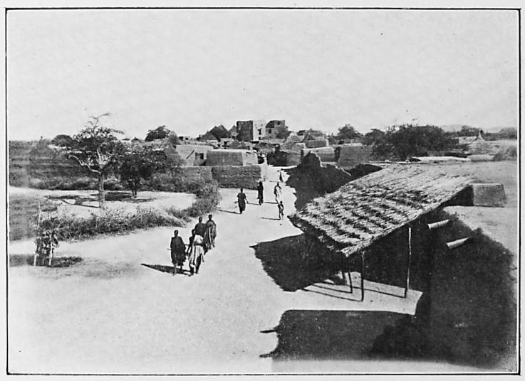 La ville d'Abéché, vue du poste Français. Dans le fond le pavillon à étage (en briques) construit du temps du Kolak Ali. From L'Afrique Équatoriale Française: le pays, les habitants, la colonisation, les pouvoirs publics. Préf. de M. Merlin. Avec 186 reproductions photographiques, 33 diagrammes, profils, et 7 cartes dont 5 en couleurs. (published 1918).